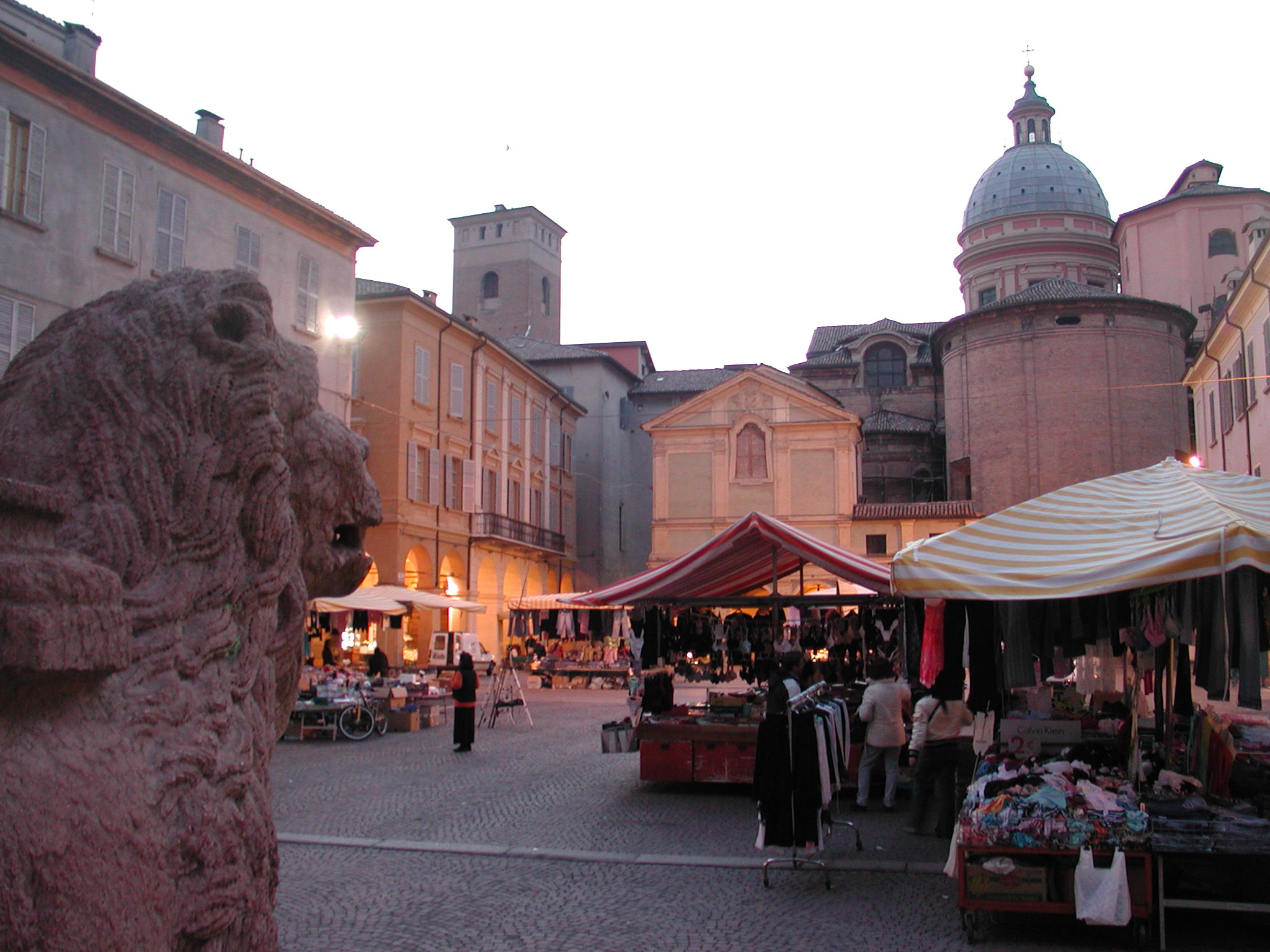 Reggio Emilia, Italy, Piazza San Prospero